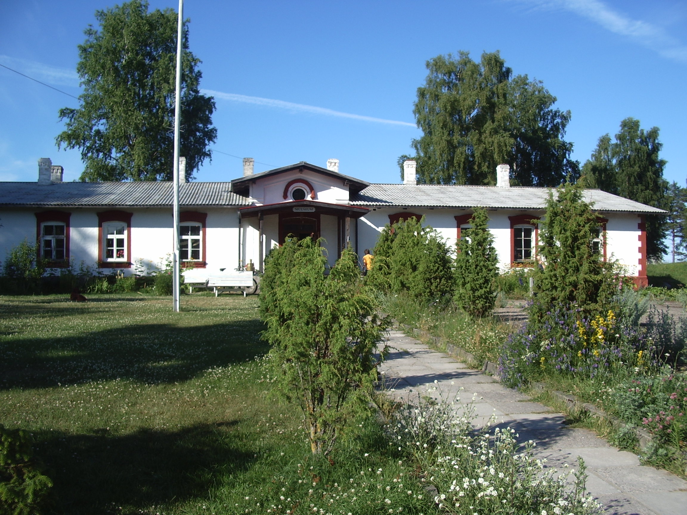 Käsmu Meremuuseum